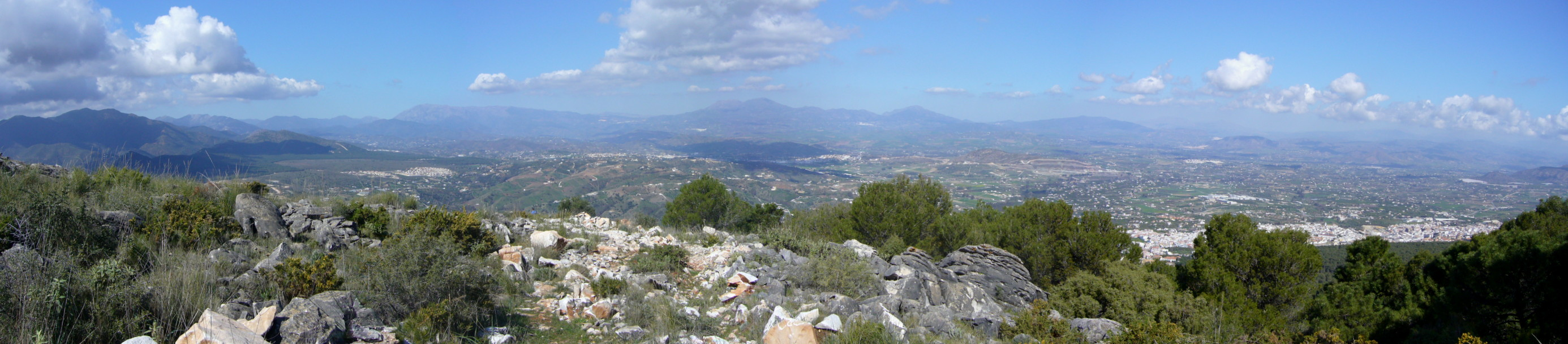 Foto panorámica del valle del guadalhorce visto desde